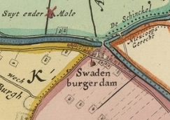 Detailopname van een historische kaart uit 1687 met Zwammerdam, dat toen nog Swadenburgerdam heette.